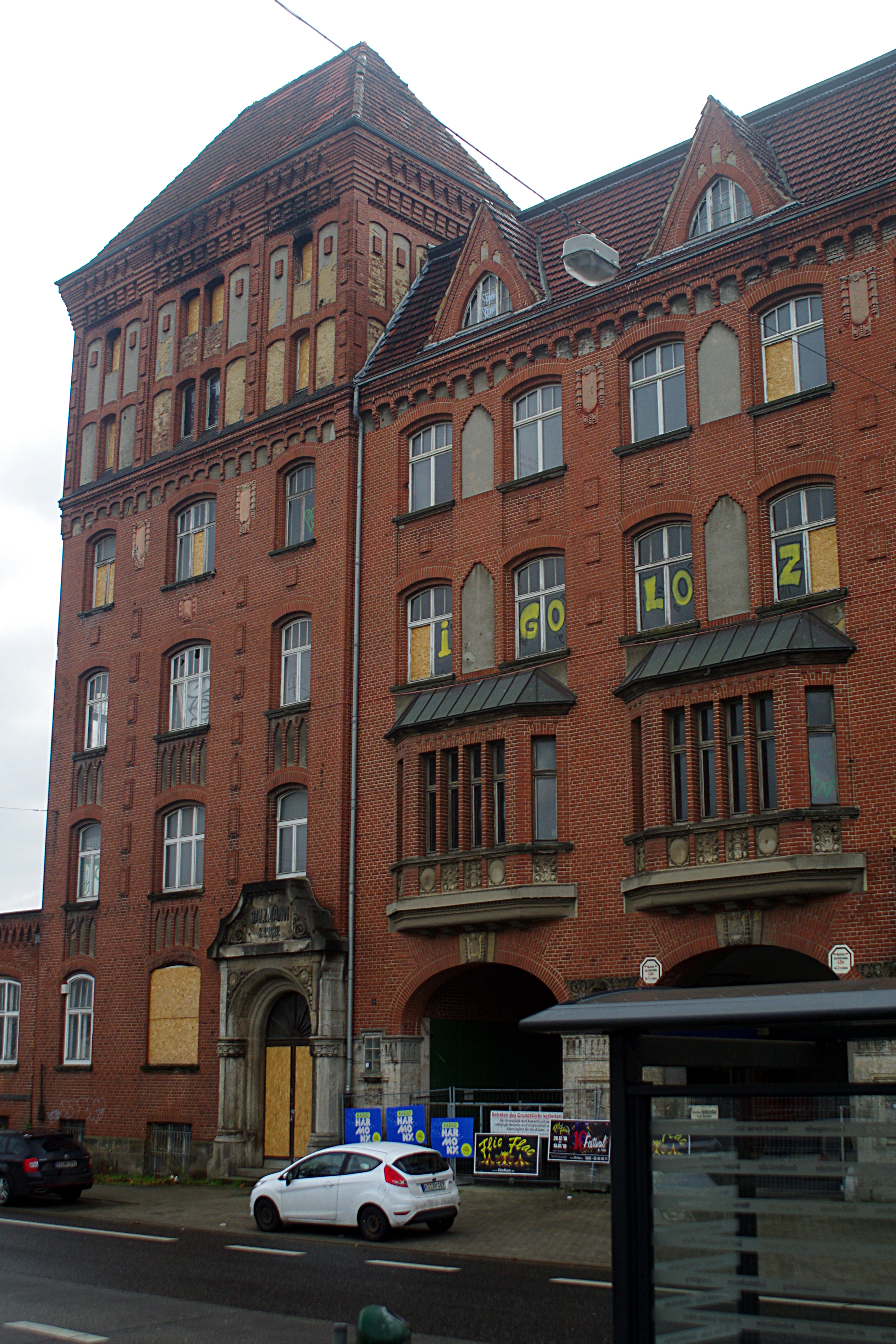 Kulturfabrik Salzmann KASSEL - vana tööstushoone